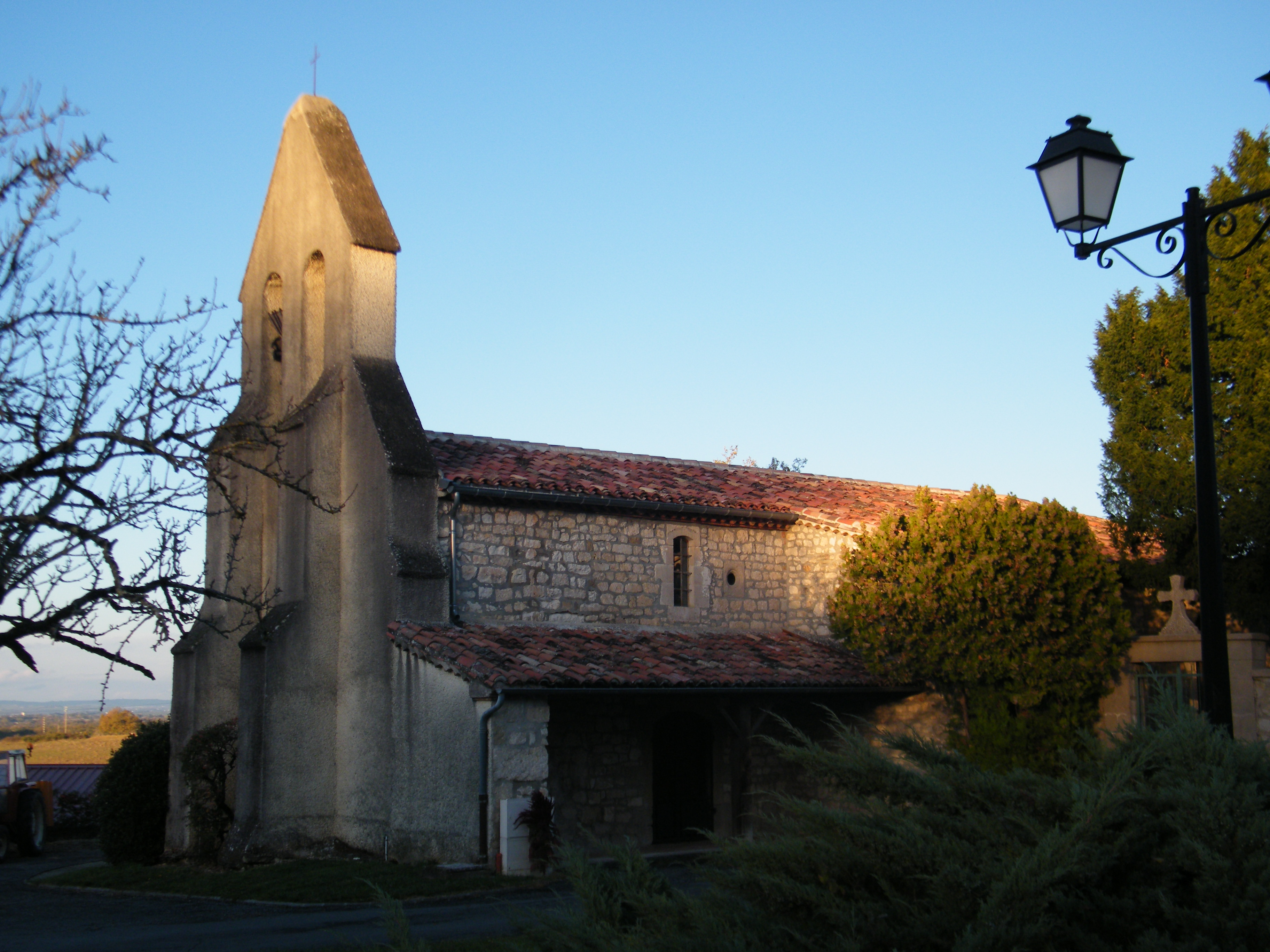 Photo de l'église de Ronel appelée Eglise Saint Martial Le chœur gothique date de la fin du XVIIIe